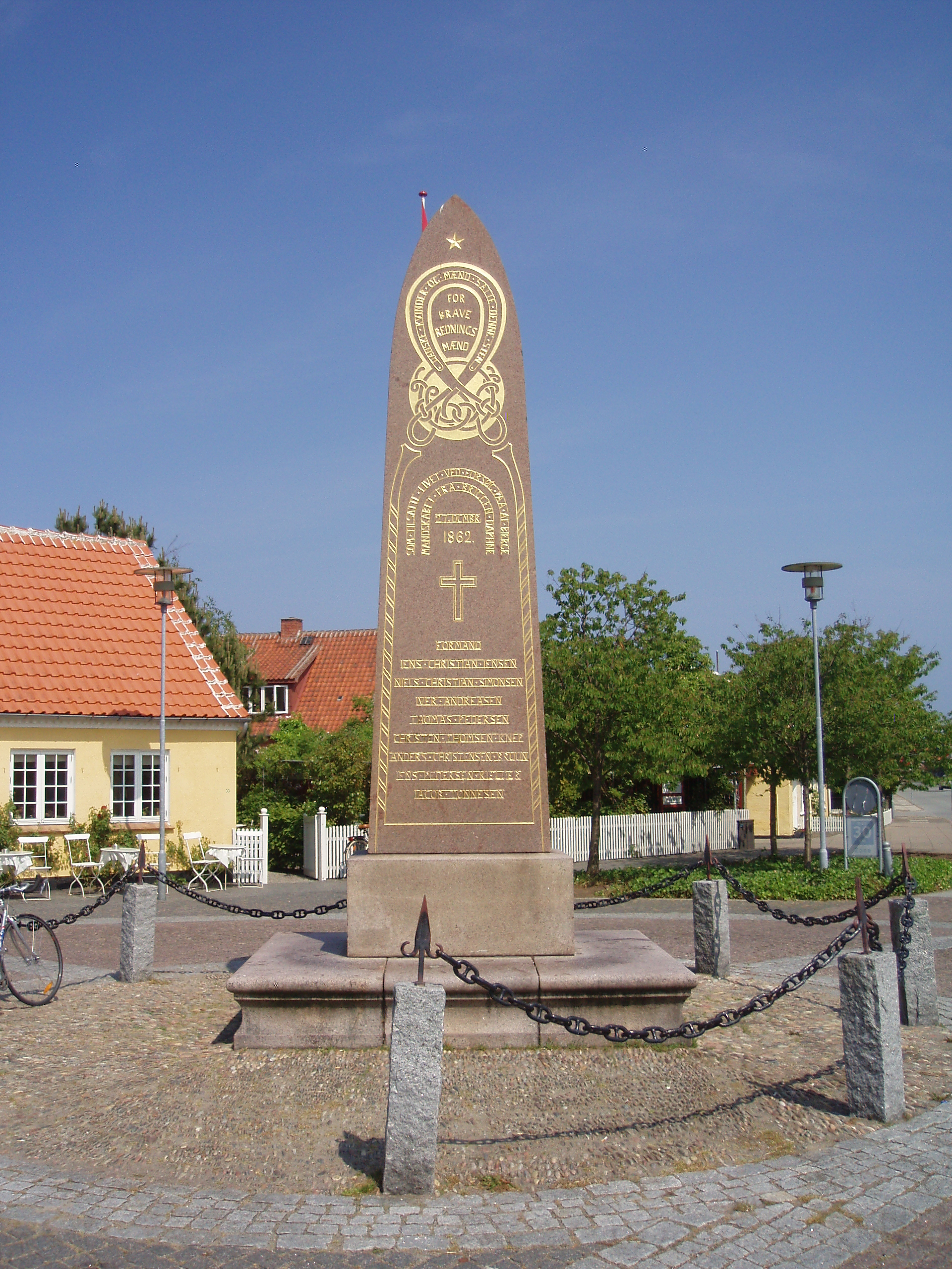 other versions: Image:Centrum_Skagen,_2007_ubt.jpeg